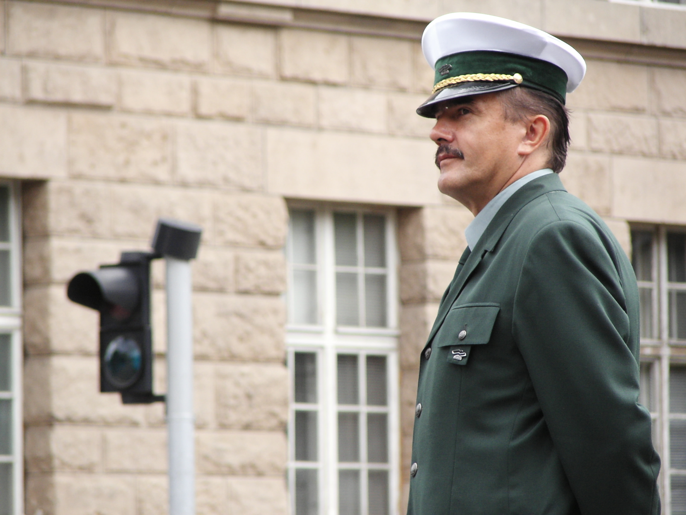 Nadzór Ruchu. Funkcjonariusz MPK Poznań.